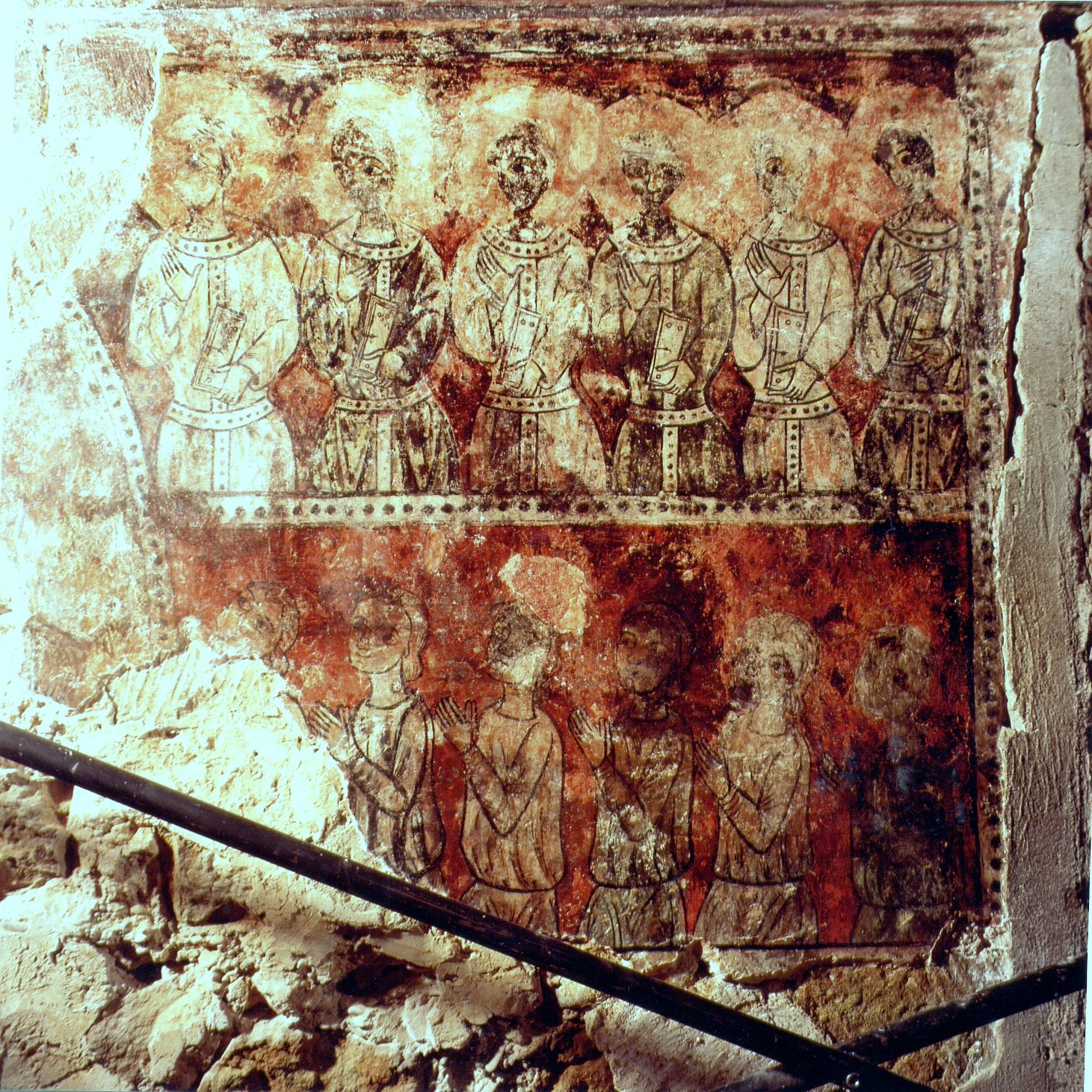 Castell templer de Gardeny. Pintura mural de la capella de migdia.